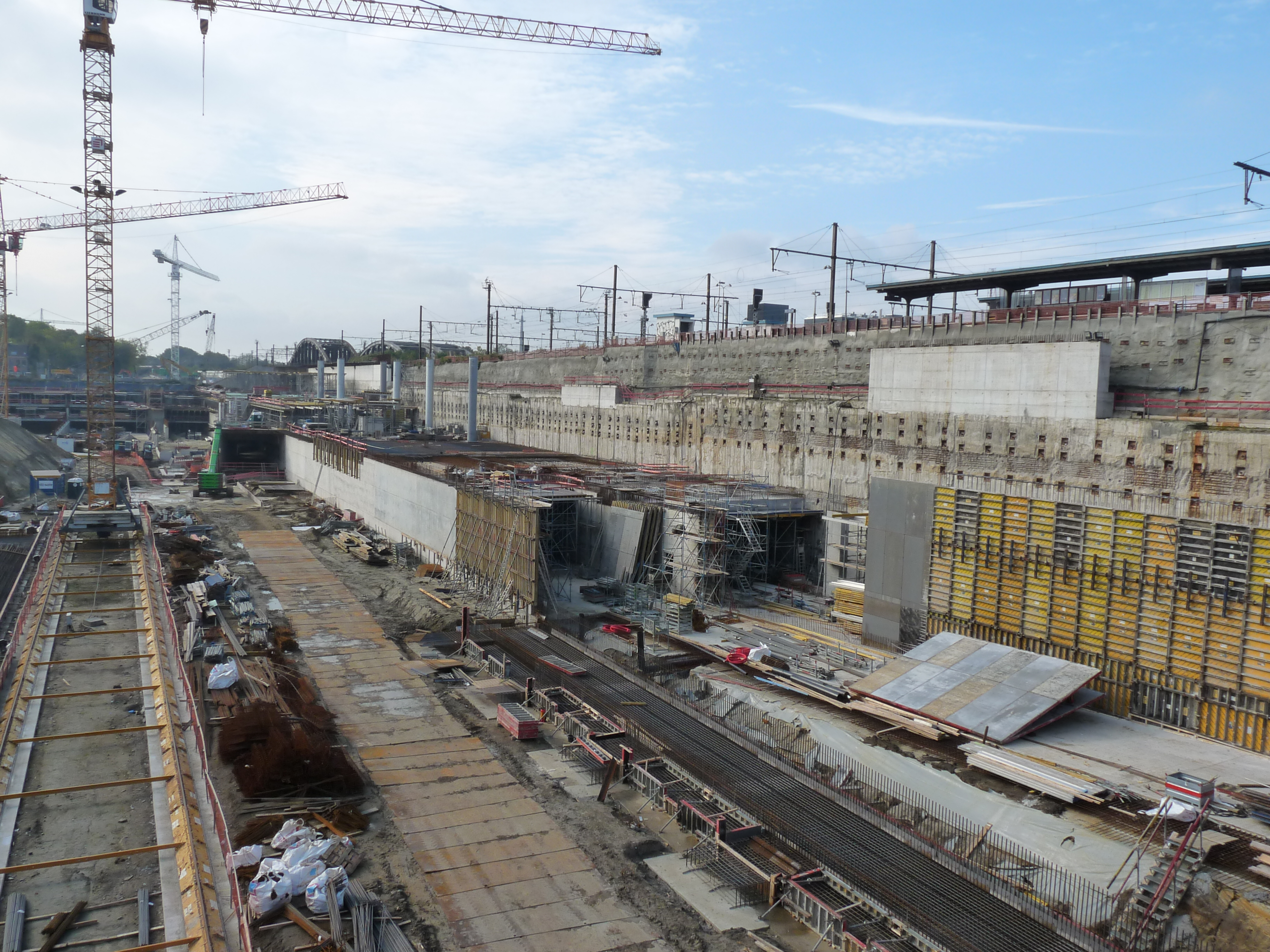 Bouwput bij Mechelen station voor stationsuitbreiding, parking en wegtunnel